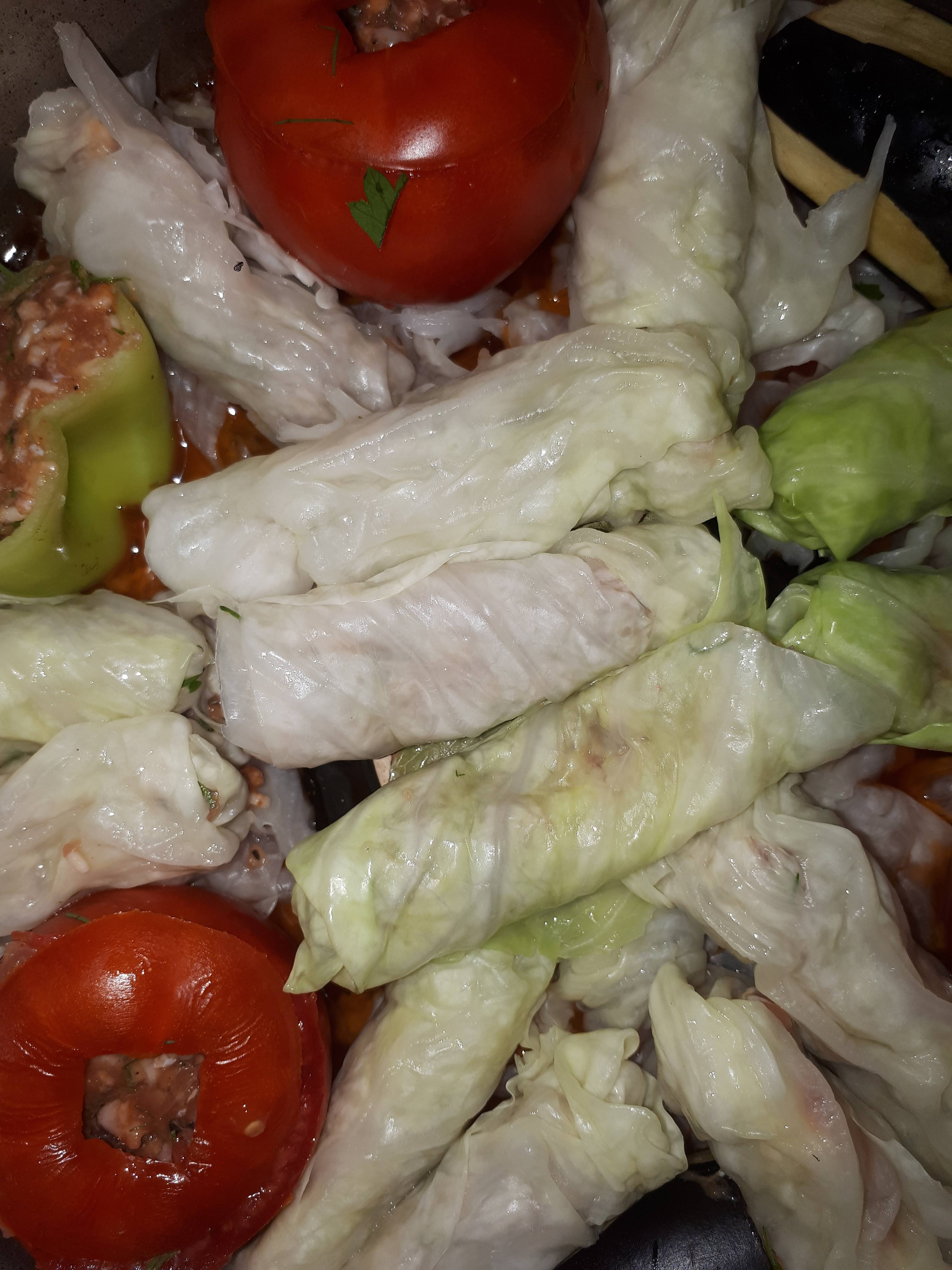 Армянская долма